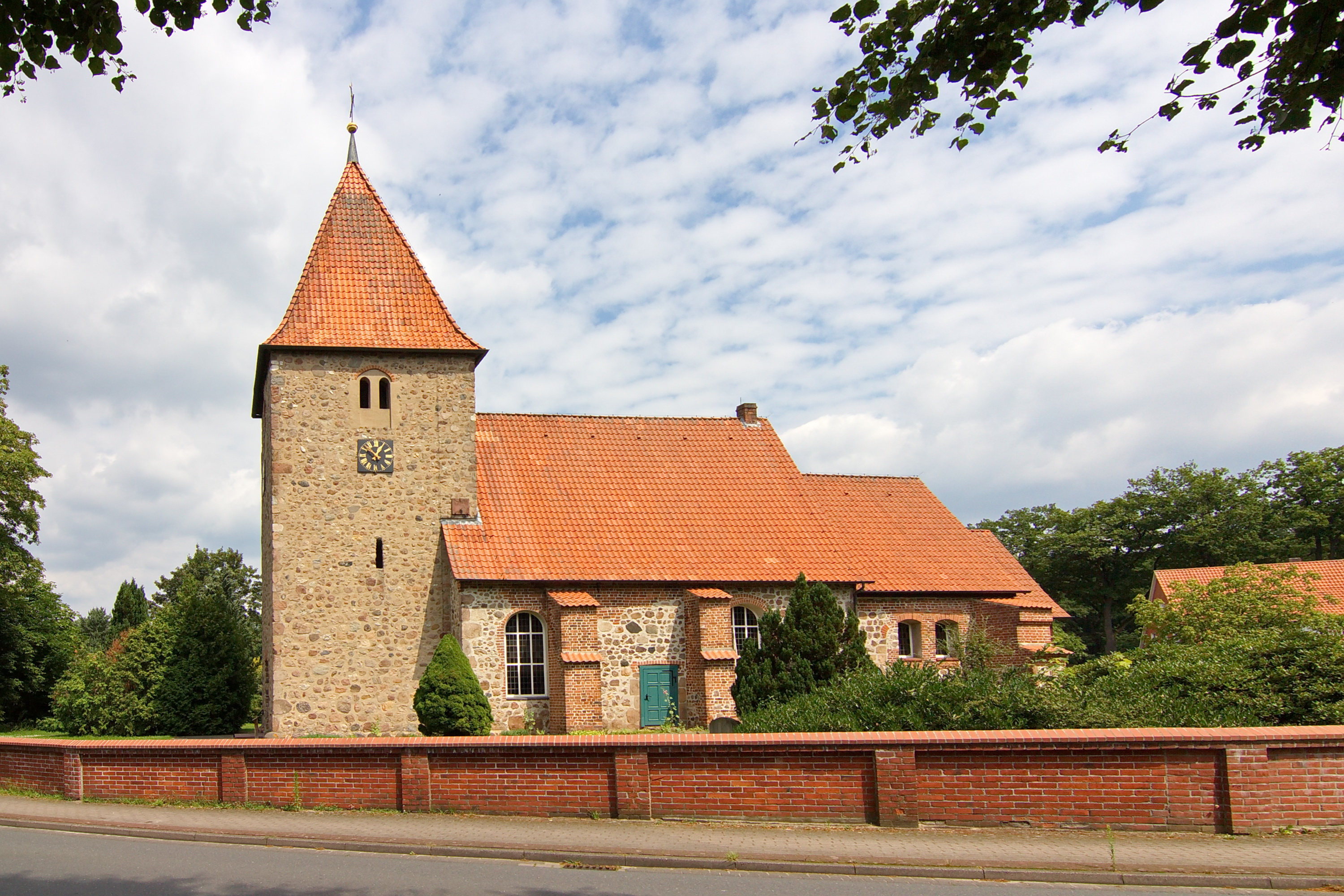 St. Bartholomäus-Kirche von 1180 in Kirchwalsede, Niedersachsen, Deutschland